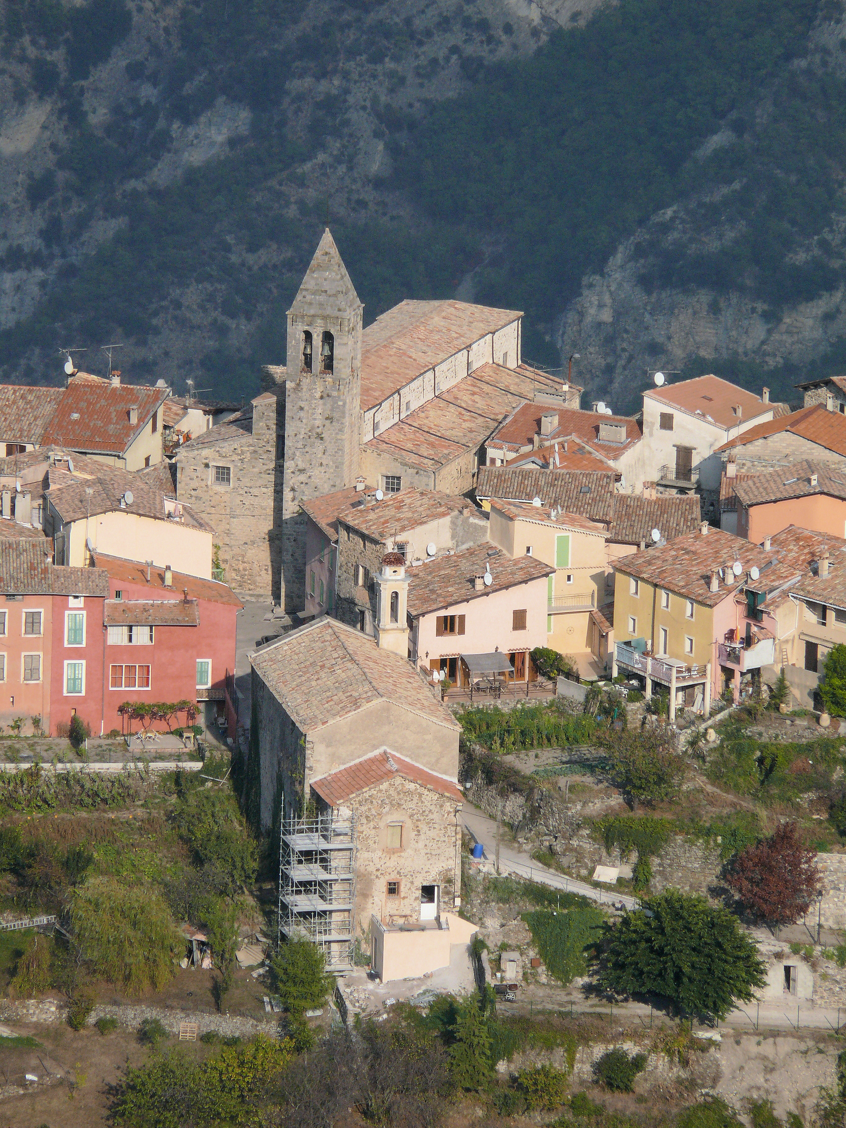 Utelle - Eglise Saint-Véran et chapelle Sainte-Croix des Pénitents Blancs